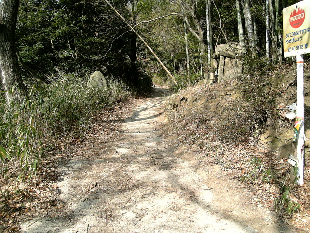 十三街道・おおと越分岐点（生駒郡平群町福貴畑）